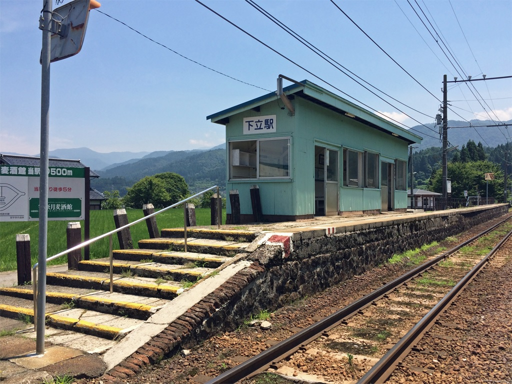 富山地方鉄道本線 下立駅